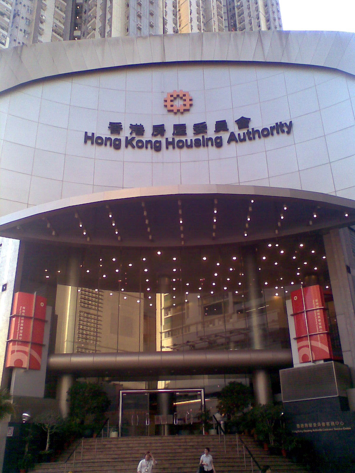 香港房屋委員會客戶服務中心